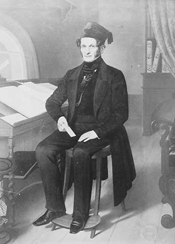 Der preussische Textil- und Maschinenbau-Unternehmer Josef Liebermann (1783-1860)